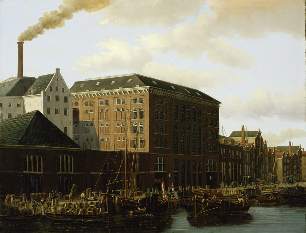 schilderij; Croockewit, H.; Beuker & Hulshoff, Fa.; stadsgezicht; stadsgezicht Amsterdam; Lauriergracht; Suikerraffinaderij Berlijn